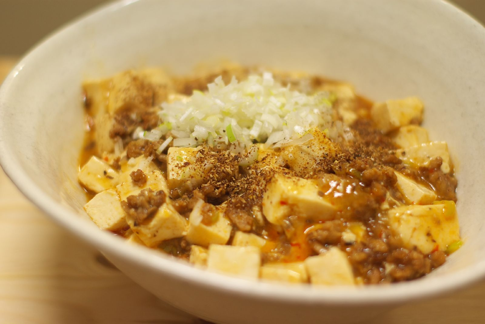 mabo tofu 久しぶりに作ったものでちょっとパンチが足りず。。